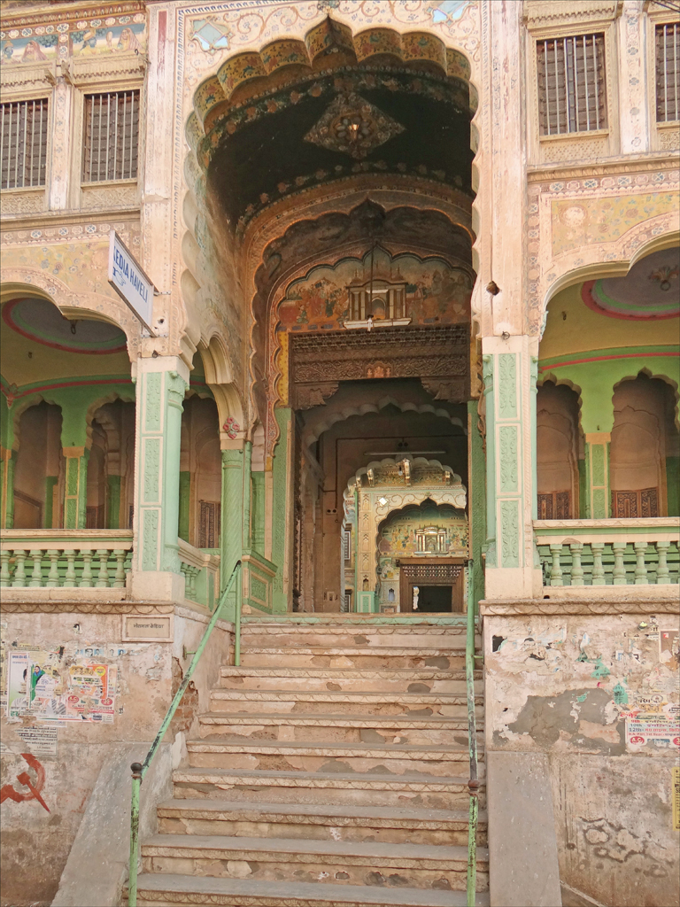 Durant la période coloniale britannique, au 19ème siècle, des marchands de l'est du Rajasthan se sont déplacés dans les villes côtières : Bombay, Madras, Calcutta où ils ont obtenu le quasi-monopole du commerce et se sont fortement enrichis. Ils ont alors construit dans leur région d'origine, où étaient restées leurs familles, de luxueuses maisons appelées les Haveli, véritables signes extérieurs de richesse. Une Haveli est construite autour de cours intérieures. La première cour sert aux réceptions et aux transactions commerciales, La deuxième cour est réservée à la famille. Les chambres sont à l'étage. Les maisons sont entièrement décorées avec des fresques relevant de l'art populaire (ou naïf) et représentant des scènes mythologiques mais également contemporaines, montrant les objets et modes de vie des grandes villes. ______________ Fatehpur, est une ville du Shekhawati au Rajasthan (Inde) riche de plusieurs centaines de haveli (maisons traditionnelles de marchands parfois de très grandes dimensions) aux foisonnants décors peints dans un style naïf. Ce type d'architecture, datant du XIXème siècle ou du début du XXème, constitue indéniablement un des attraits touristiques du Rajasthan. Toutefois ces maisons sont pour la plupart dans un état de dégradation avancée et se trouvent dans un environnement urbain particulièrement sale. A Fatehpur comme dans les autres villes de la région, l'omniprésence de déchets accumulés depuis des mois dans les rues est l'un des sujets d'étonnement des occidentaux qui parcourent cette région, réputée touristique. Article de Wikipedia sur Fatehpur